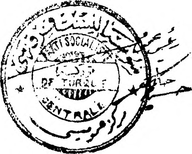 Türkiye Sosyalist Fırkası mührü.